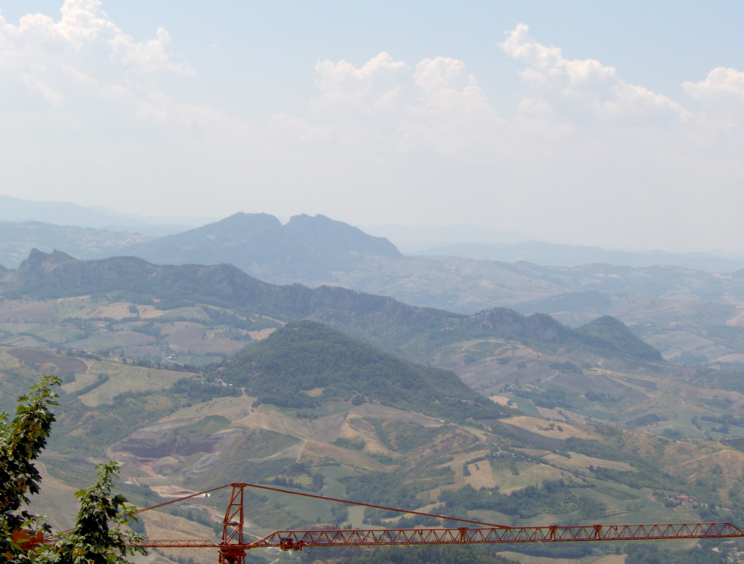 San Marino - Vaizdas nuo miesto kalno; view from city mountain